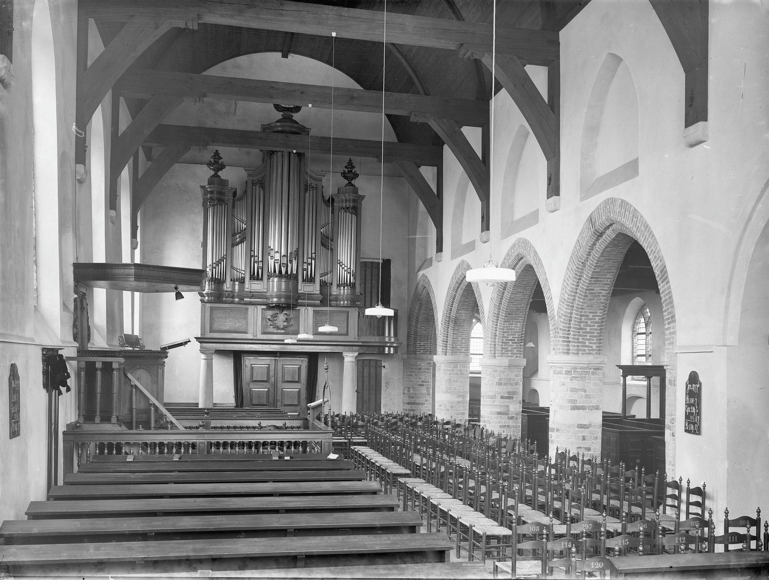 N.H.Kerk en Toren: interieur naar het westen na de restauratie